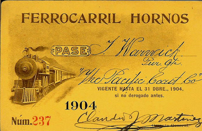 Pase del Ferrocarril Hornos, esta línea era un ferrocarril de vía angosta que corría desde Viesca hasta San Pedro, Coah. conectando así el ferrocarril Coahuila-Pacífico (Torreon a Saltillo vía Parras), con el FC Internacional (Torreón a Piedras Negras vía Saltillo), y el FC de Gómez Palacio a Monterrey, la base principal estaba en la hacienda de Santa Ana de Hornos, próxima a Viesca. Era costumbre habitual que los ferrocarriles expidieran "pases" personales a diversos ciudadanos (ejecutivos principalmente) para viajar sin costo en el tren. El FC Hornos dejó de circular cerca de 1930, nunca se pudo recuperar del daño que le fue infringido durante las batallas de 1914.